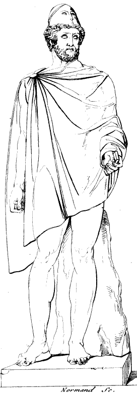 Standbeeld van (vermoedelijk) Phokion in de Vaticaanse Musea.